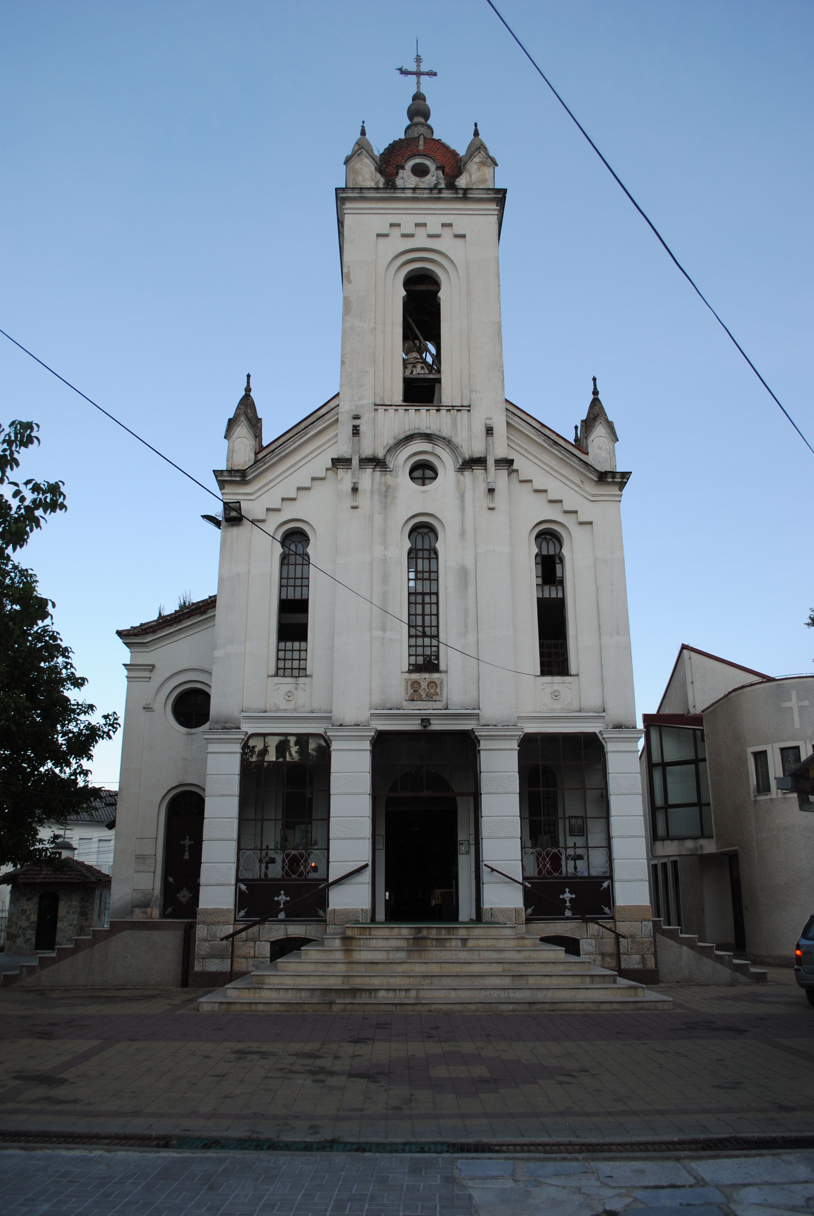 Поглед кон влезот на Црквата “Св.Кирил и Методиј” во Струмица Ова е фотографија на споменик на културата во Македонија со типски код: A01This is a a photo of a cultural monument in North Macedonia with type id: A01